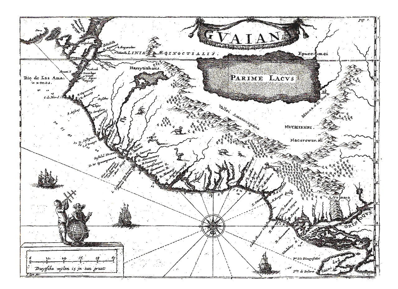 17de-eeuwse kaart van Parima. Eigen scan voor publiek domein.